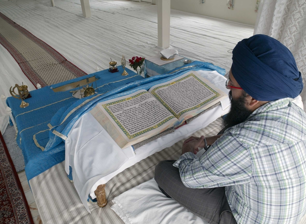 Singh, Sukhwinder i Gurdwara Sri Guru Nanak Dev Ji, forsamlingshuset for sikher i Alnabru i Oslo.